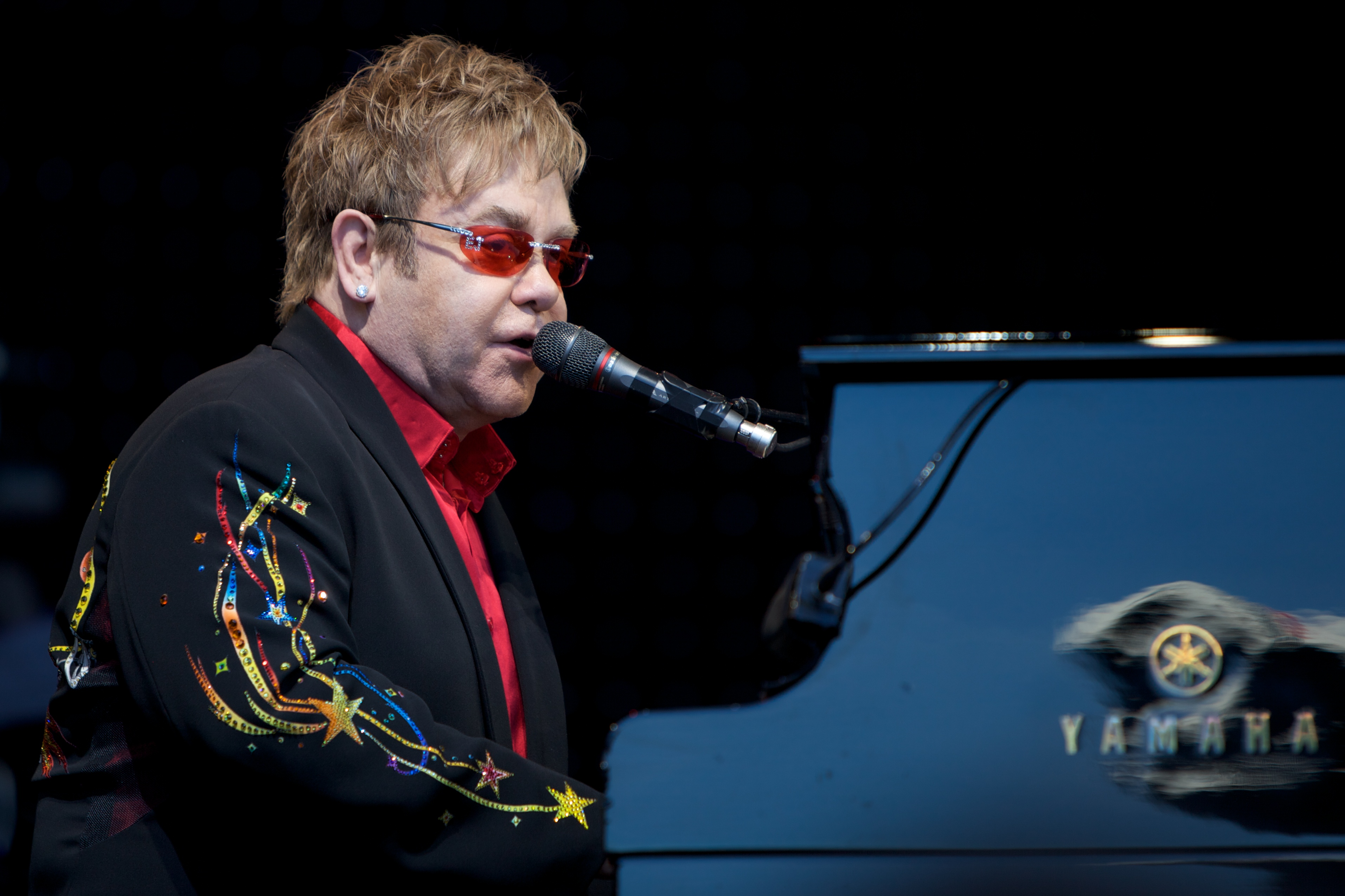 Elton John in Skagerak Arena, Skien, Norway, June 20th 2009